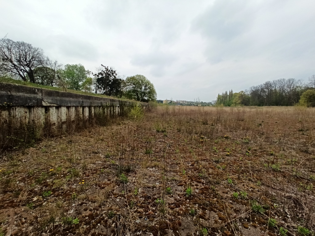 Elbląg basen odkryty 1934, ruina rok 2020